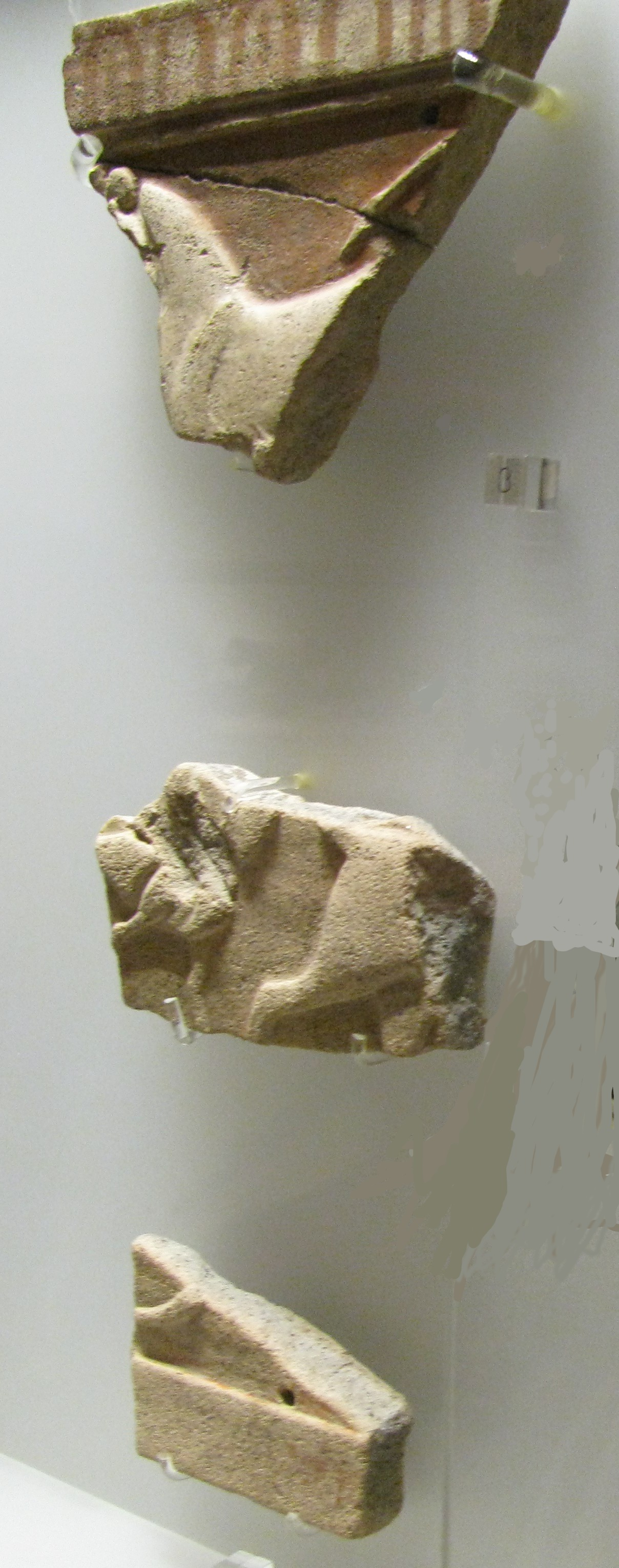 Tessons de plaques décoratives en terre cuite, VIe siècle av. J.-C. (période étrusque), fouilles de la Regia, sur le forum romain. Objets exposés dans la section épigraphique du musée des thermes de Dioclétien, Rome